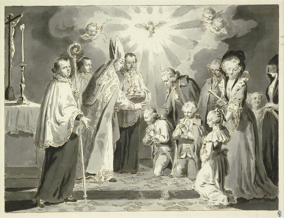 Firmung, aus einer Serie der sieben Sakramente: Federzeichnung, ca. 38,5 x 52,5 cm; hergestellt im Auftrag von Padre Ghedini